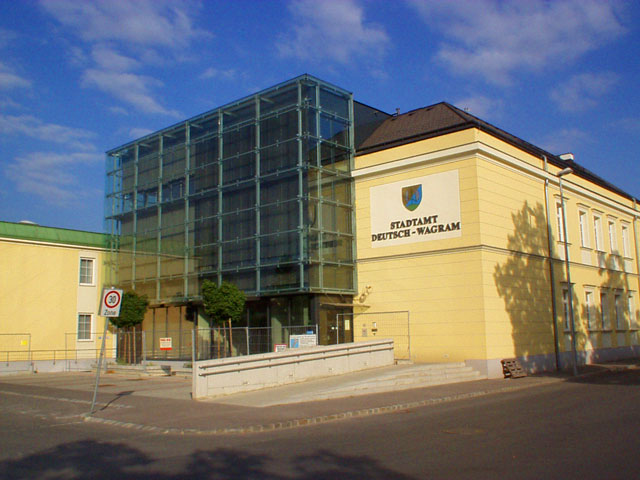 City Hall Deutsch-Wagram